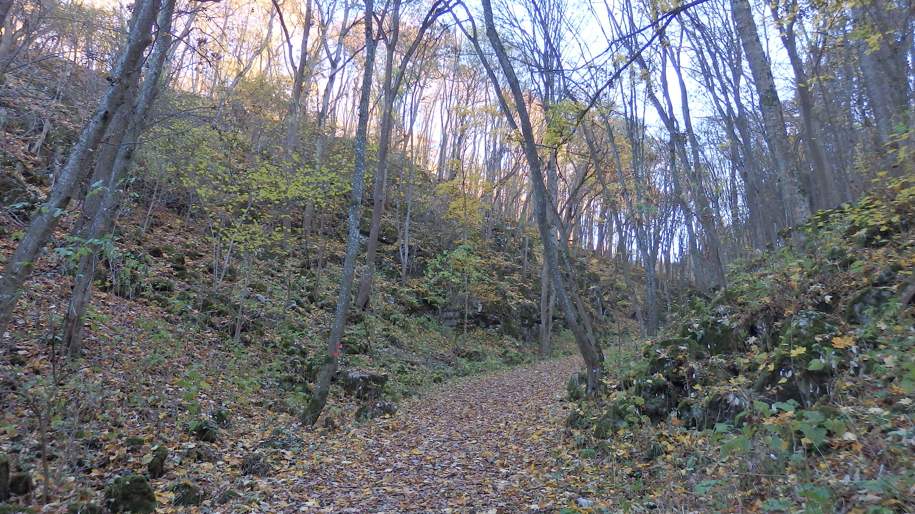 Kamenný žlíbek, údolí v CHKO Moravský kras, západní část ústící do údolí Říčky